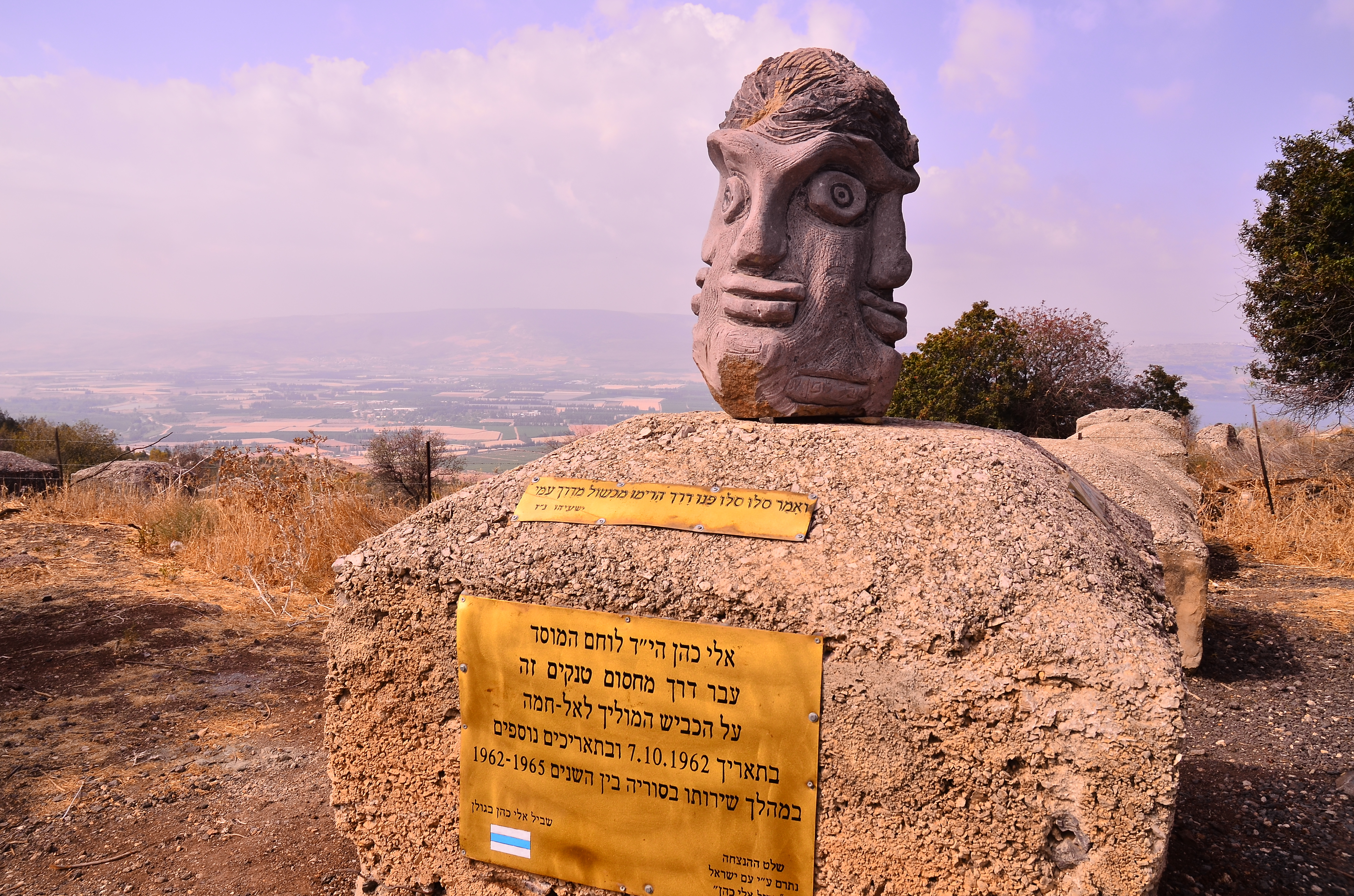 רמת הגולן